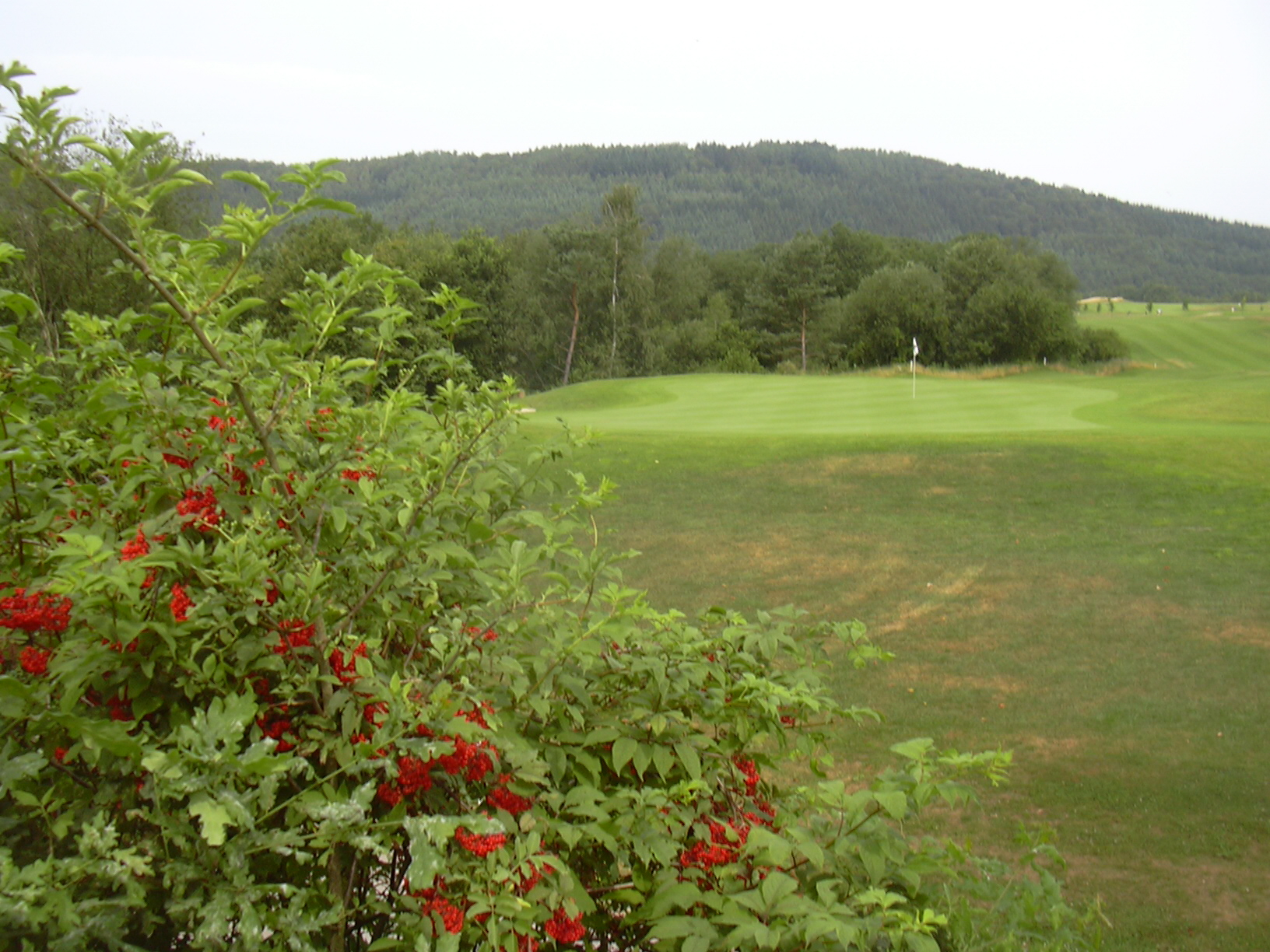 Golf course Pfälzerwald, near Waldfischbach-Burgalben, Pfälzerwald/Germany